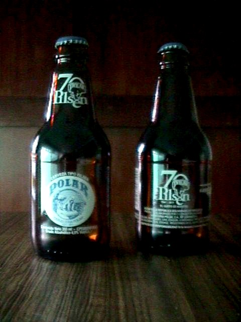 Botella de Cerveza Polar tipo Pilsen